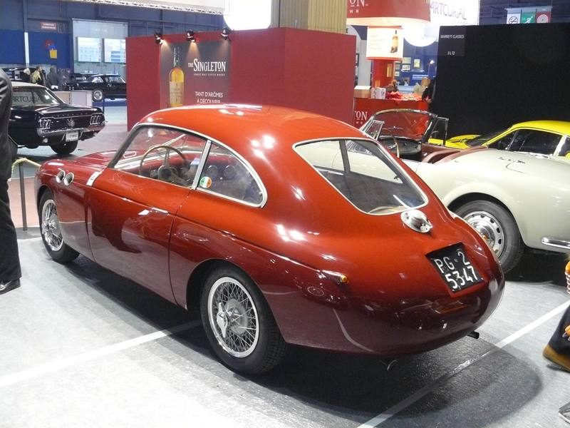 Retromobile 2012